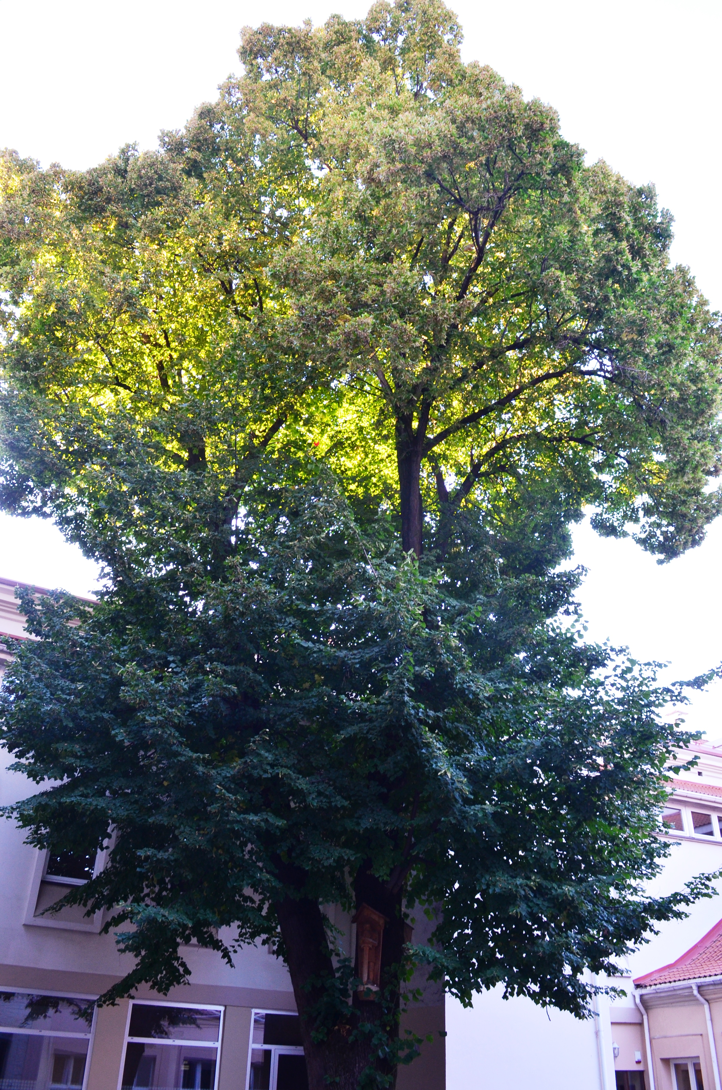 Saugoma liepa, VU M. Daukšos kieme